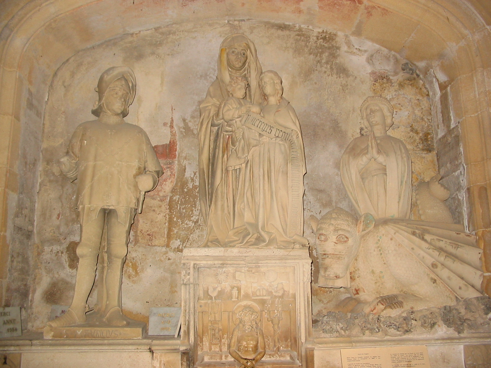 Autel votif en pierre dit des Aygosi (Saint-sauveur, Aix-en-Provence)